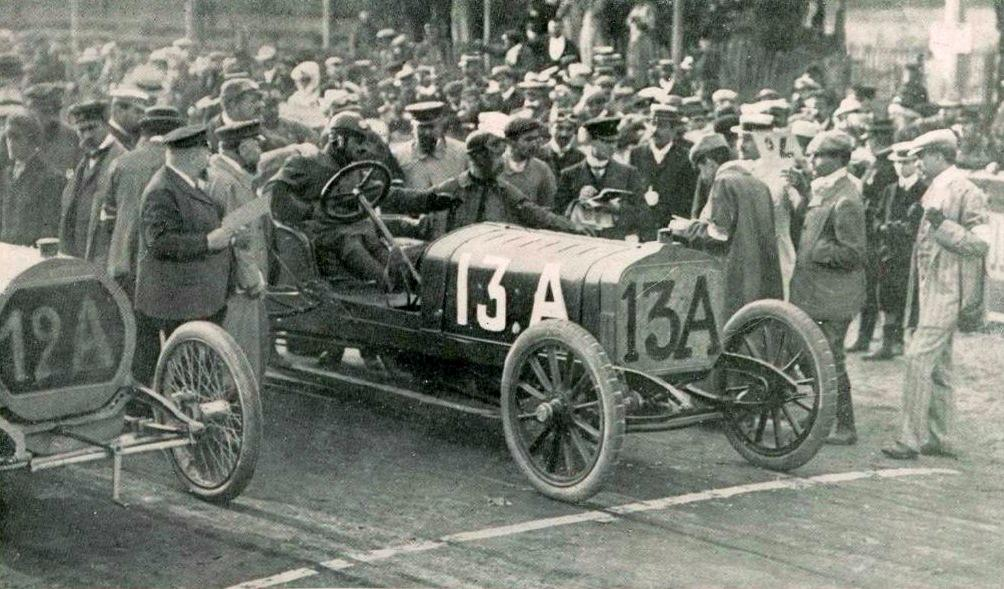 Albert Clément, deuxième de la première journée du Grand Prix de l'ACF 1906.